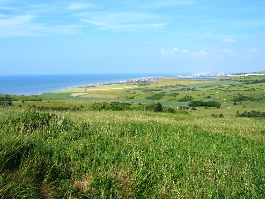 Opaalkust